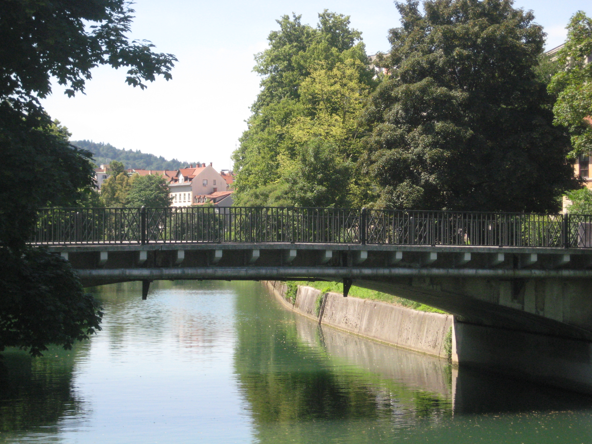 Šempetrski most čez Ljubljanico v Ljubljani.